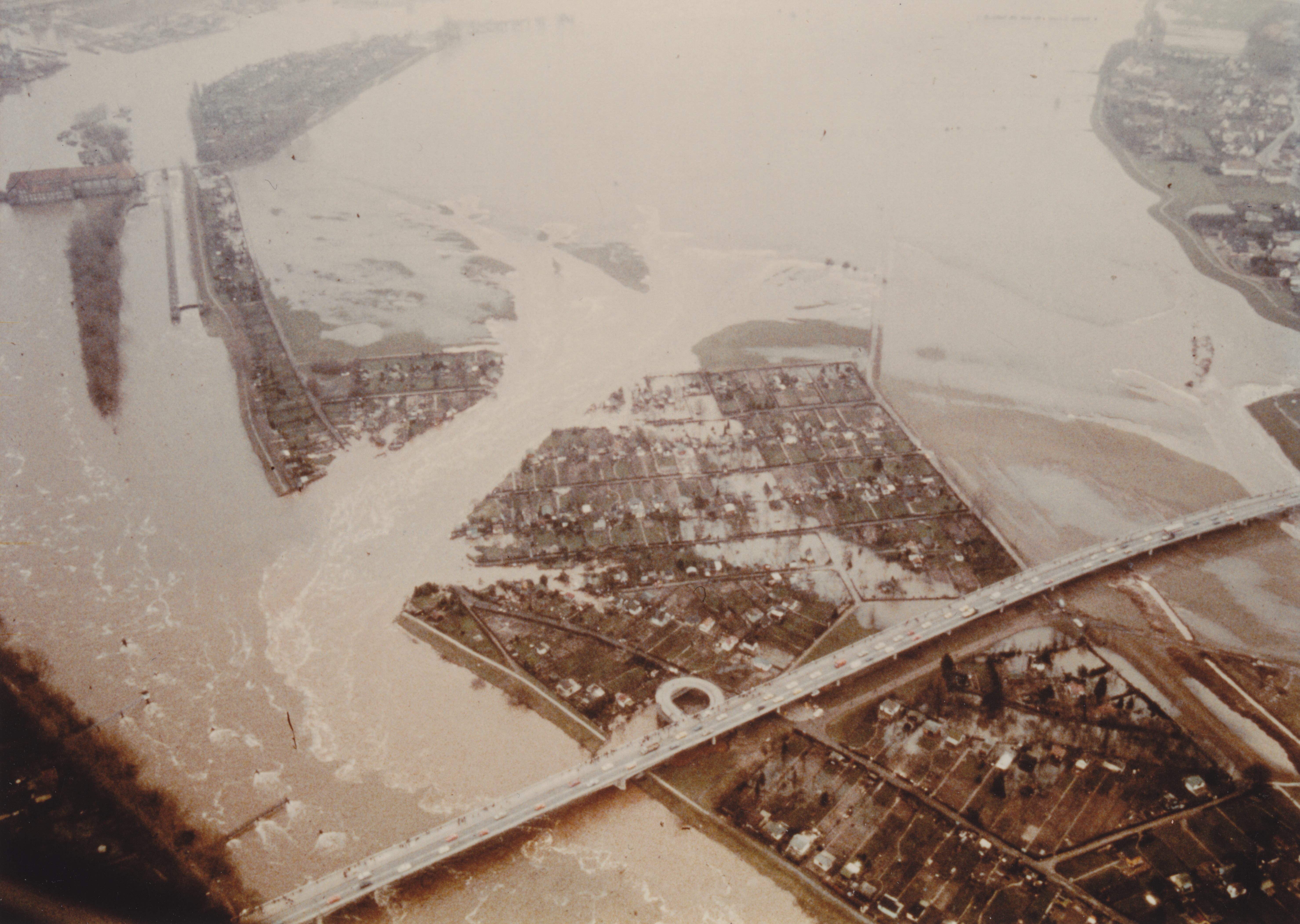 Blick Richtung Osten auf die heutige Karl-Carstens-Brücke (Vordergrund), den Hochwasserabfluss der Weser nach dem Durchbruch der Verwallung. Oben links die alte schleuse mit dem Krafthaus. Die Brücke wurde 1970 fertig gestellt und hieß bis 1999 Werderbrücke